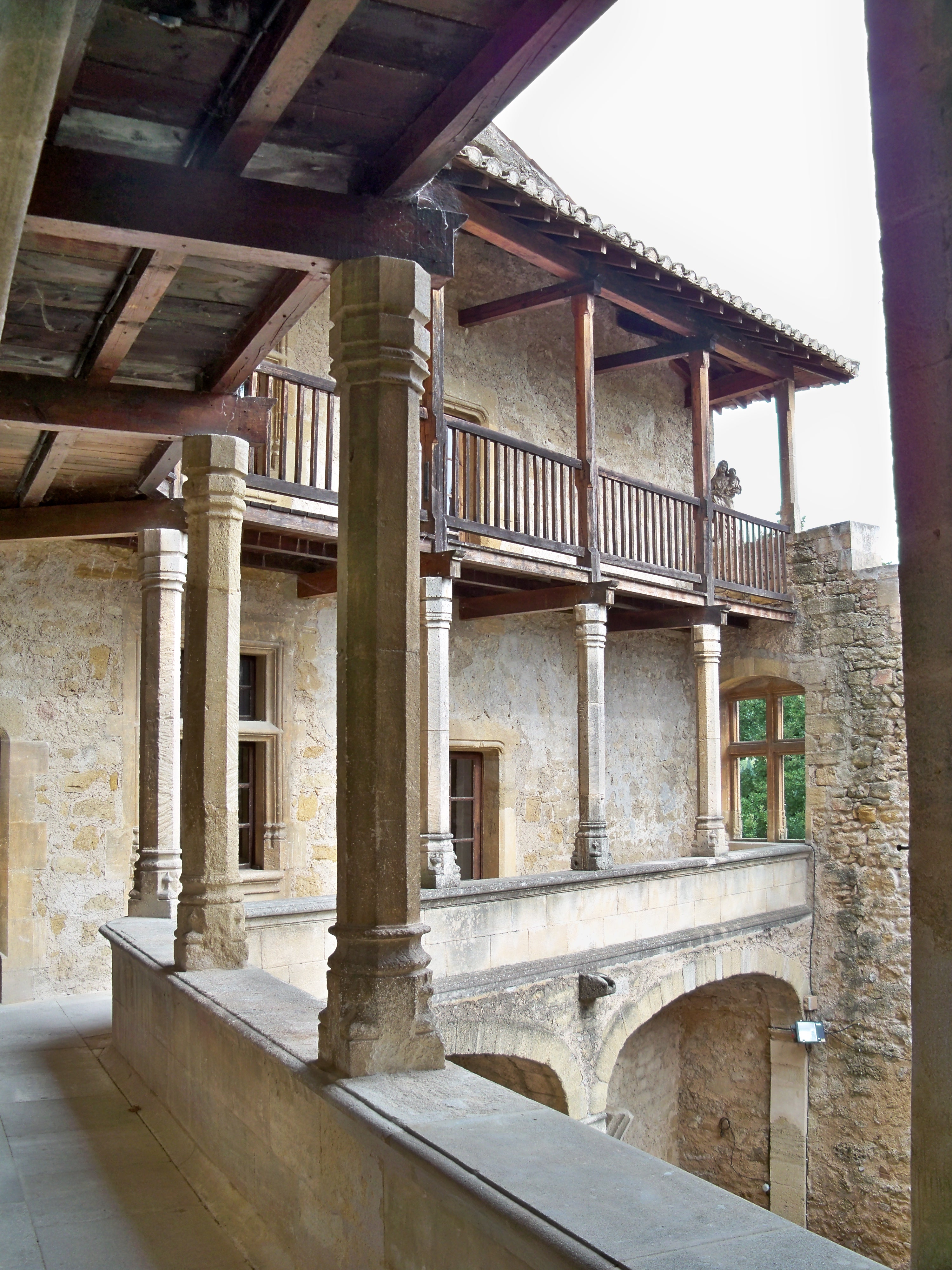 Château de Lourmarin, Vauculuse (84), France.